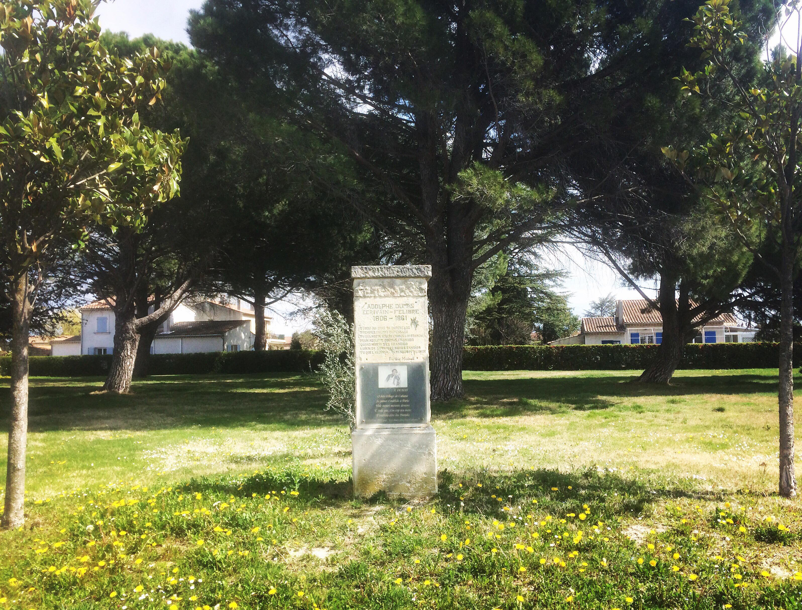 Monument à la mémoire du poète Adolphe Dumas (1806-1861) inauguré en 2013 à Cabannes (Bouches-du-Rhône), réalisé par l'association des Amis du Vieux Cabannes